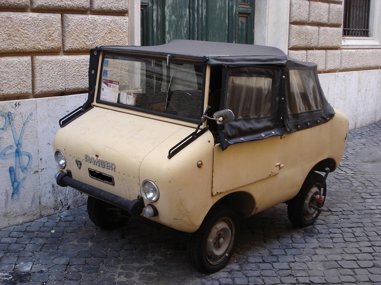 Ferves Ranger